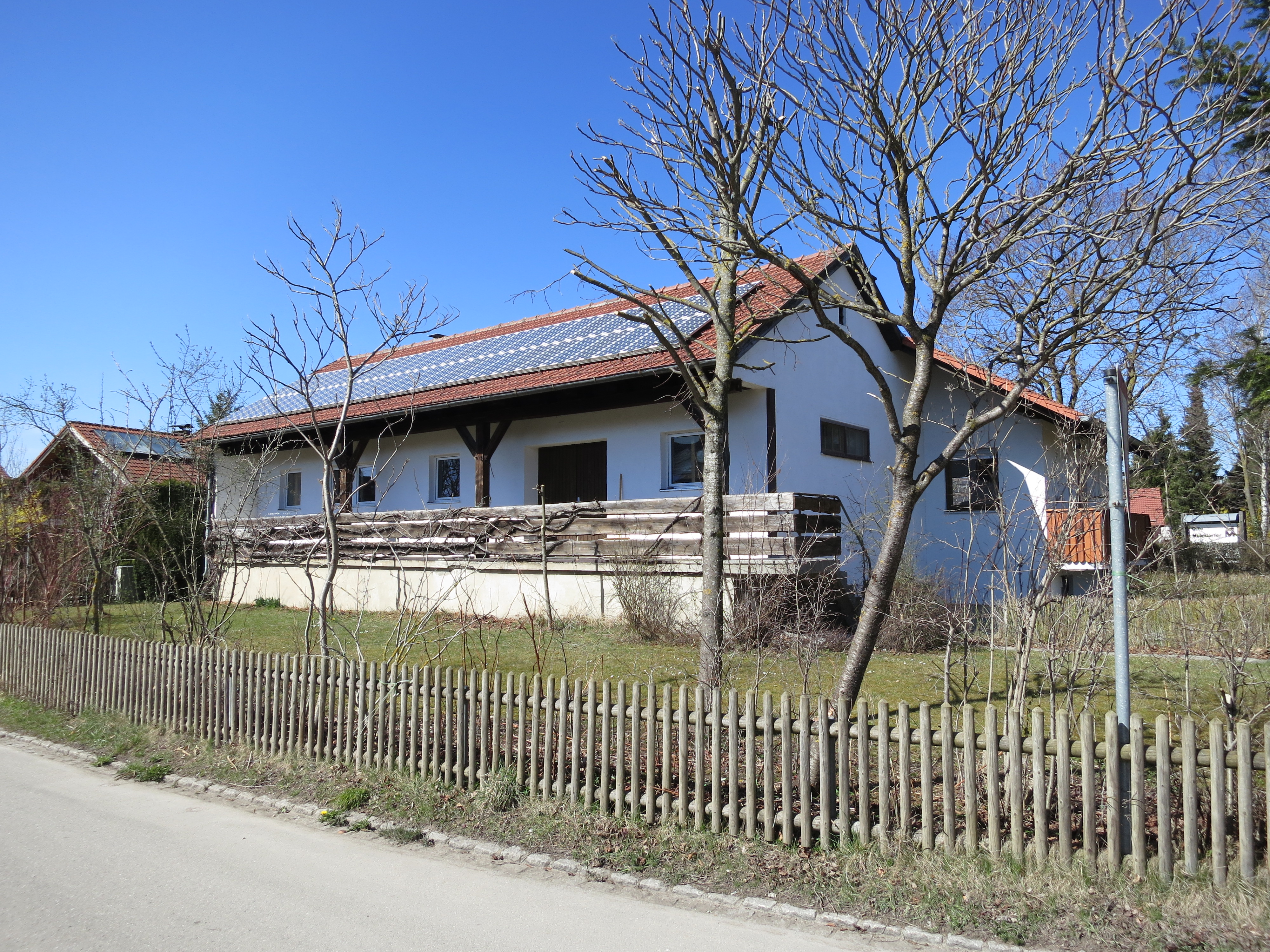 Ehemalige Lagerhalle des Bahnhofs Linden (Schwab) an der stillgelegten Bahnstrecke Kaufbeuren–Schongau